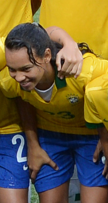 Selecionado feminino do Brasil, campeãs do Torneio Internacional de Brasília - 2013